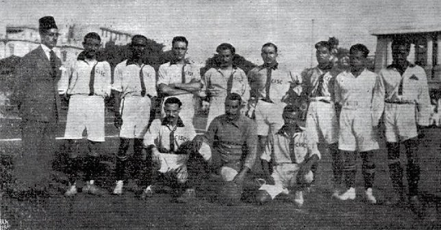 نادي الزمالك هو أول نادي مصري يفوز ببطولة رسمية1921